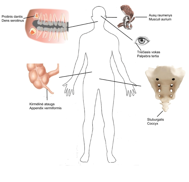 Žmogaus rudimentai